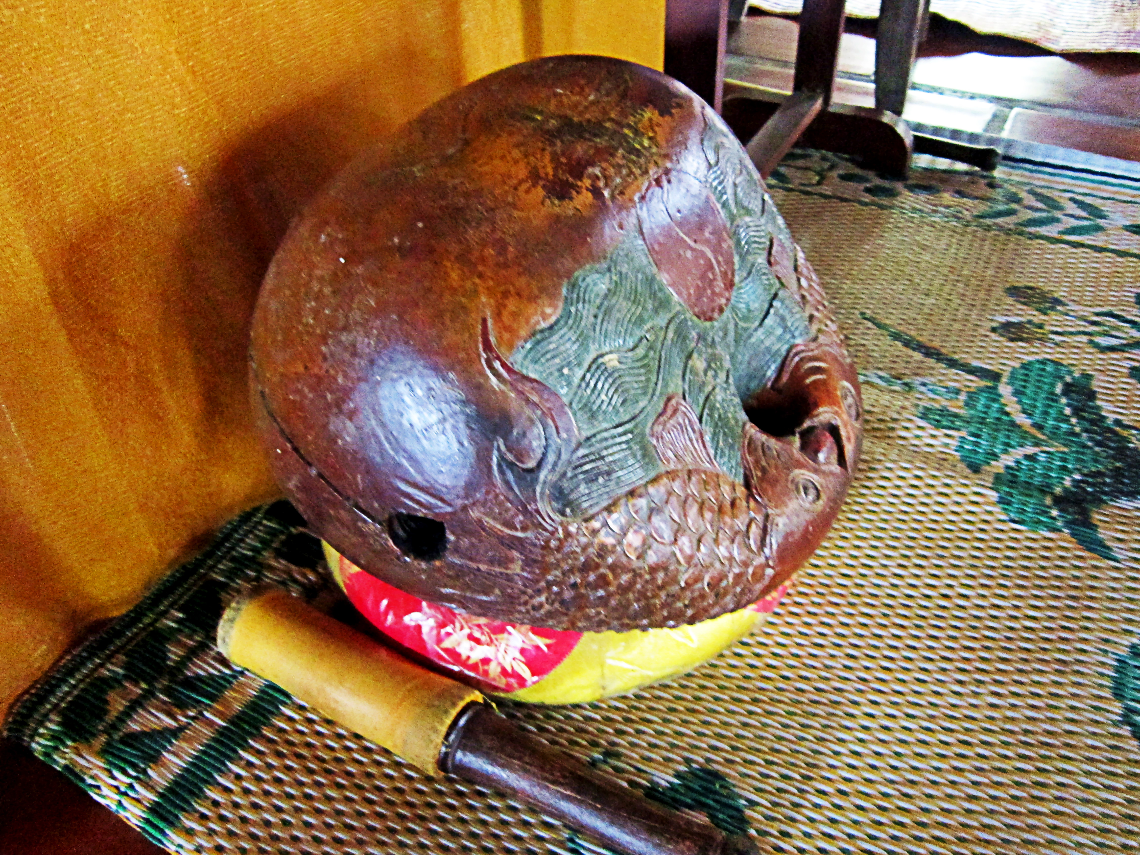 Mõ dùng để tụng kinh ở chùa Hội Linh (Cần Thơ, Việt Nam), được làm hồi đầu thế kỷ 20..